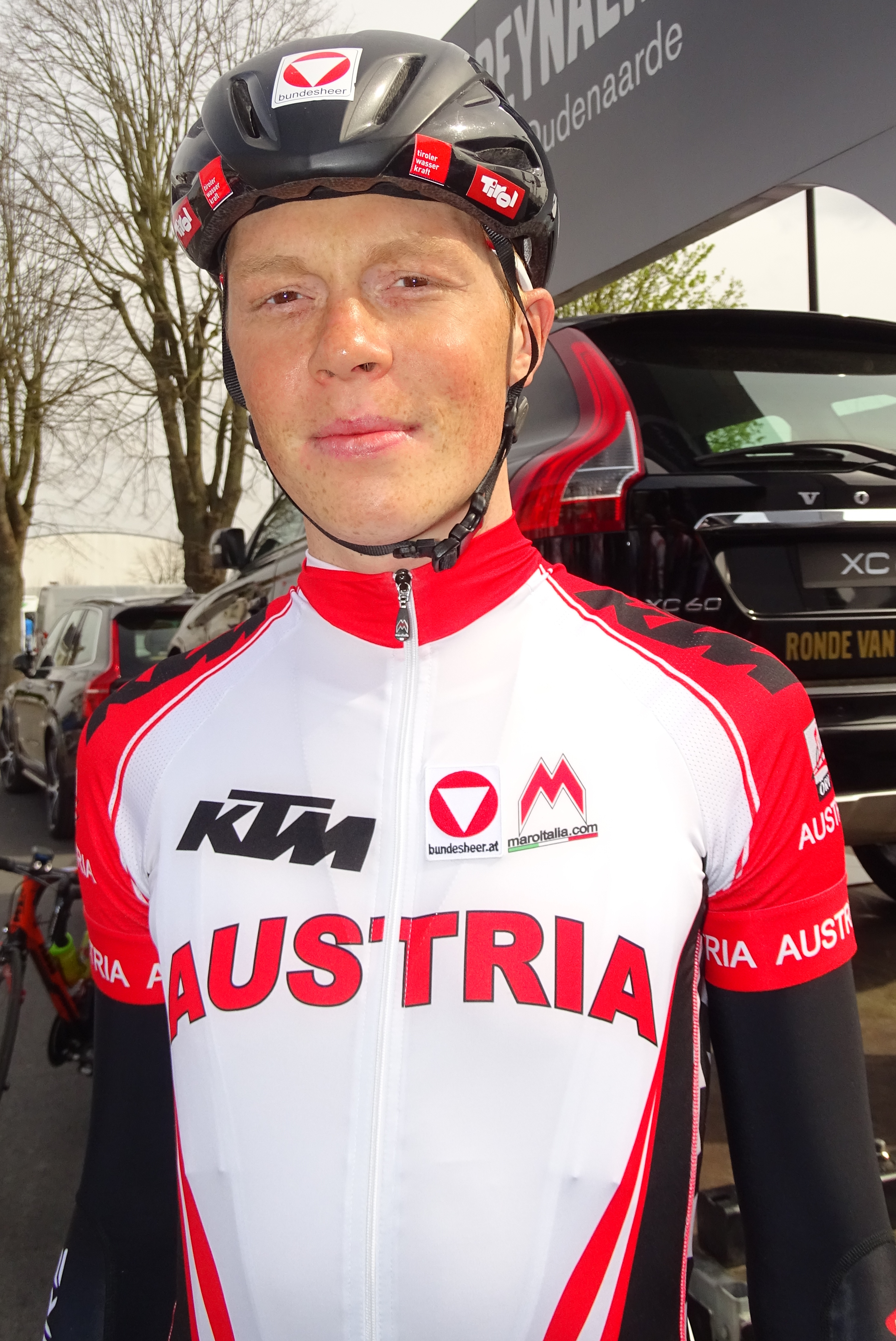 Reportage réalisé le samedi 9 avril à l'occasion du départ et de l'arrivée du Tour des Flandres espoirs 2016 à Audenarde, Belgique.